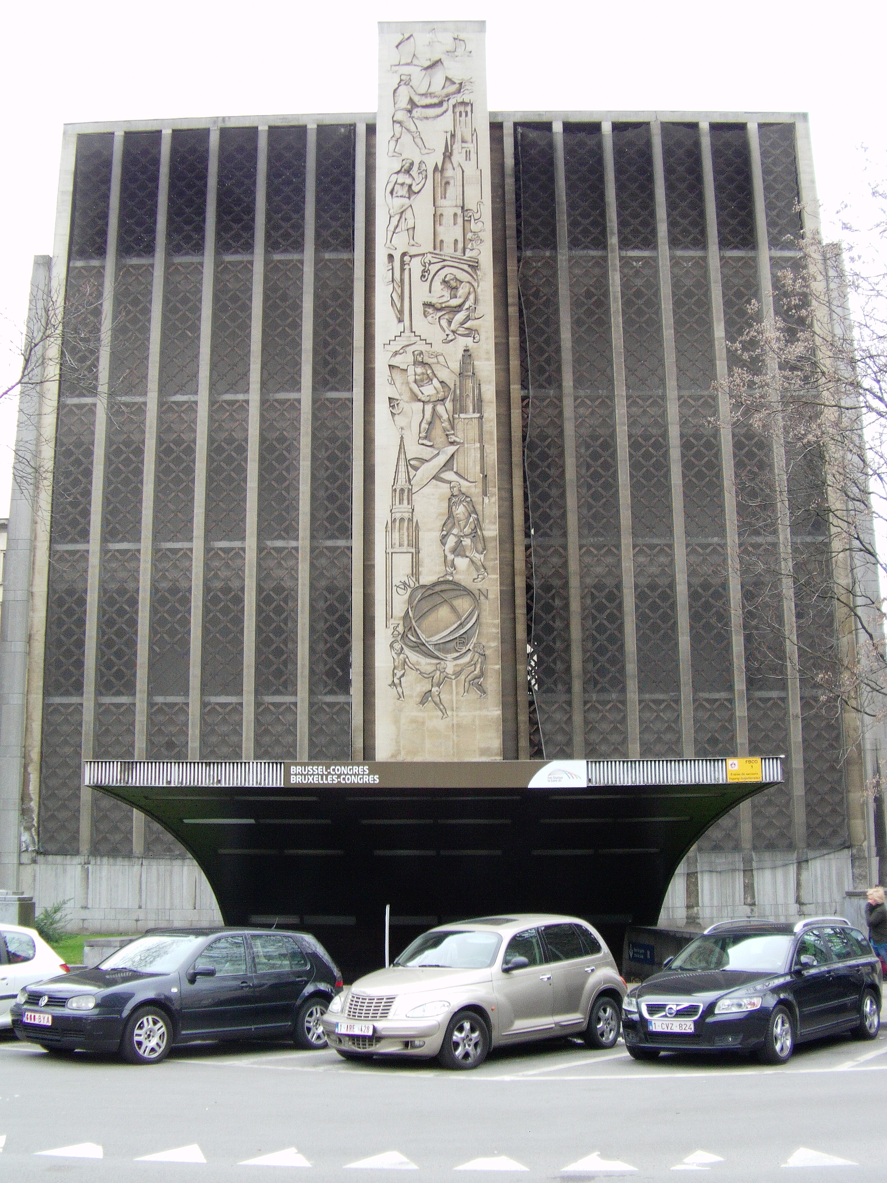 Gare souterraine de chemin de fer belge à bruxelles